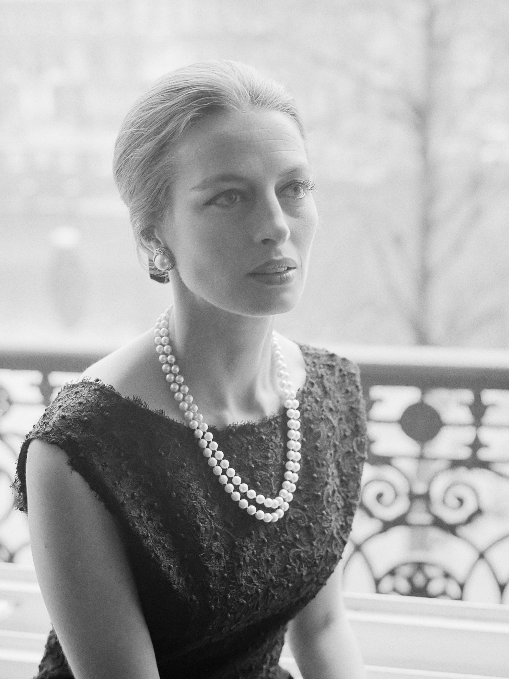 Franse actrice Capucine 25 april 1962